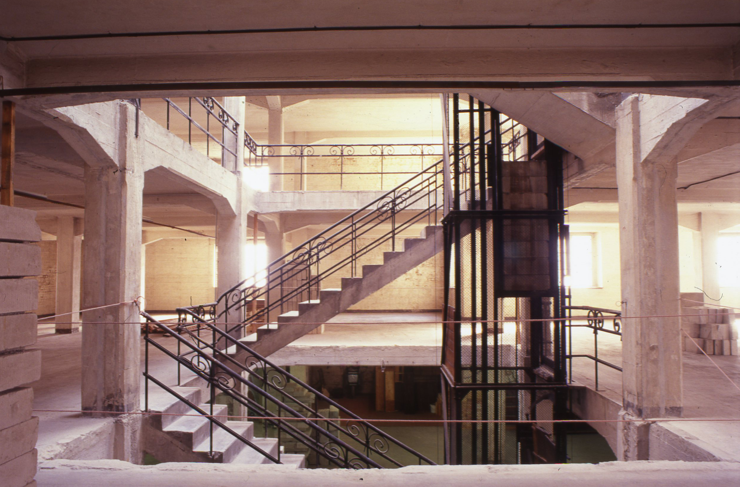 Komplettsanierung von 2001 bis 2002